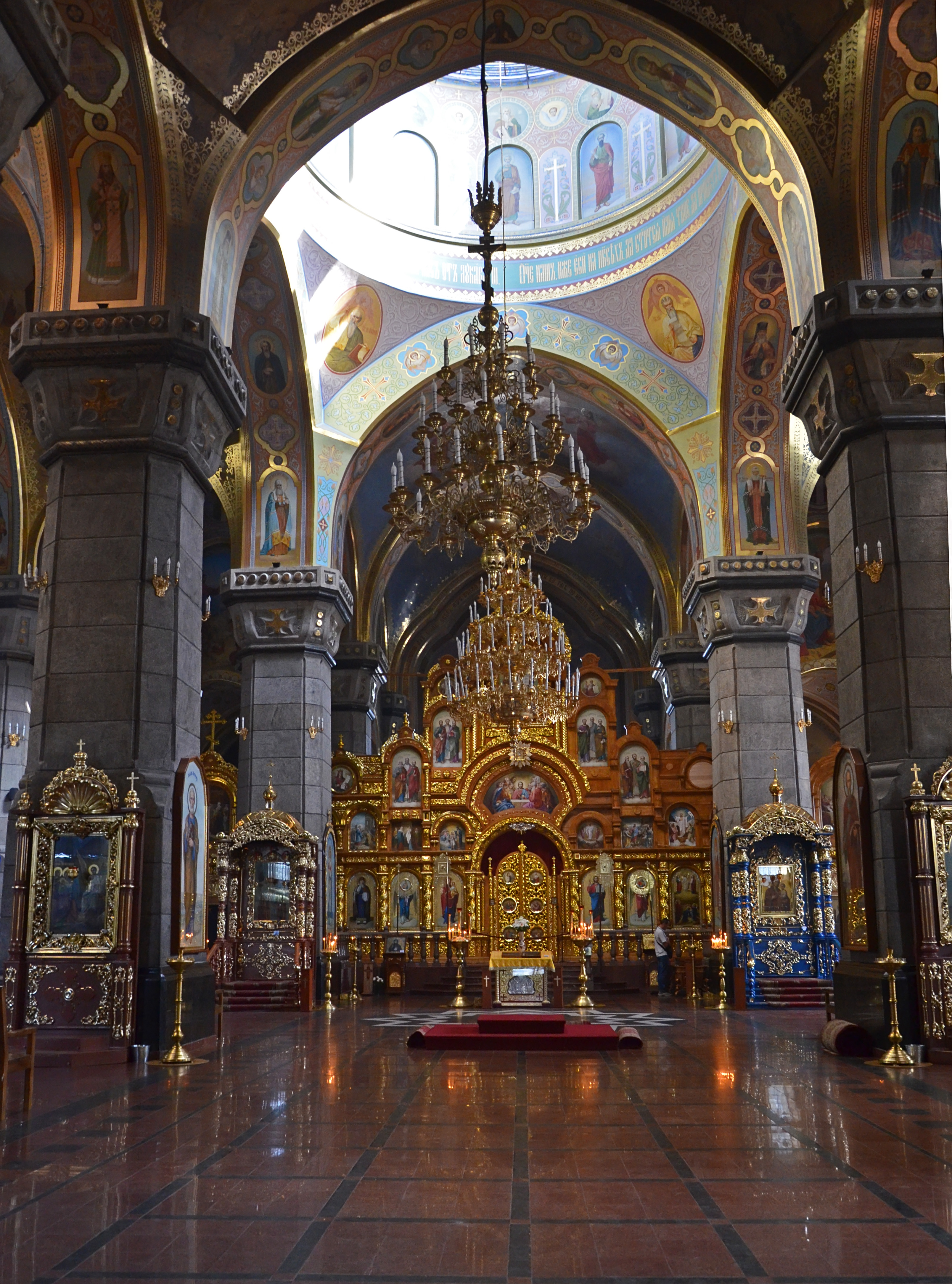 Преображенський собор, Житомир, Майдан Перемоги, 12/14